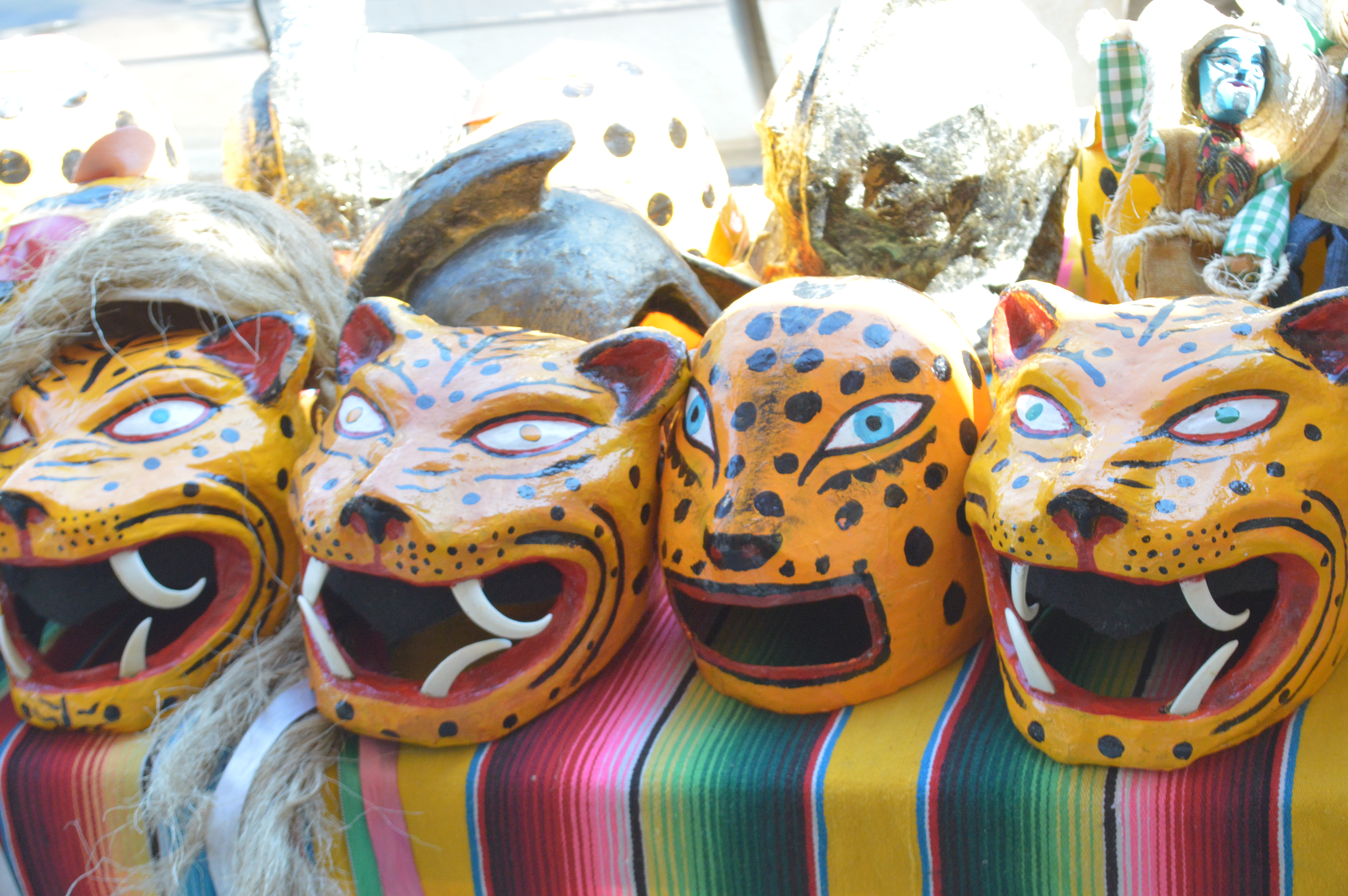 Uno de los personajes más emblemáticos de la danza de los Tlacololeros es el tigre que baila junto a los demás danzantes. Es importante aclarar que el tigre en realidad es jaguar, y al final del paseo del pendón los tigres de dos barrios diferentes se enfrentan en un combate al que se le denomina el "porrazo del tigre".